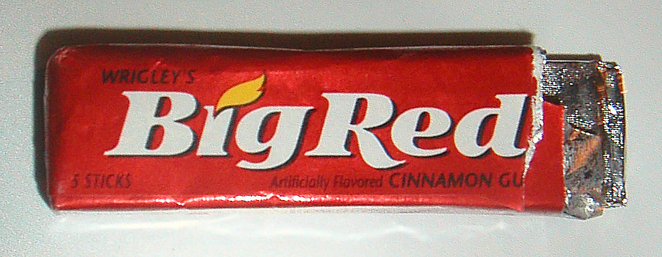 Kaneltyggegummi Wrigley Big Red Cinnamon Gum